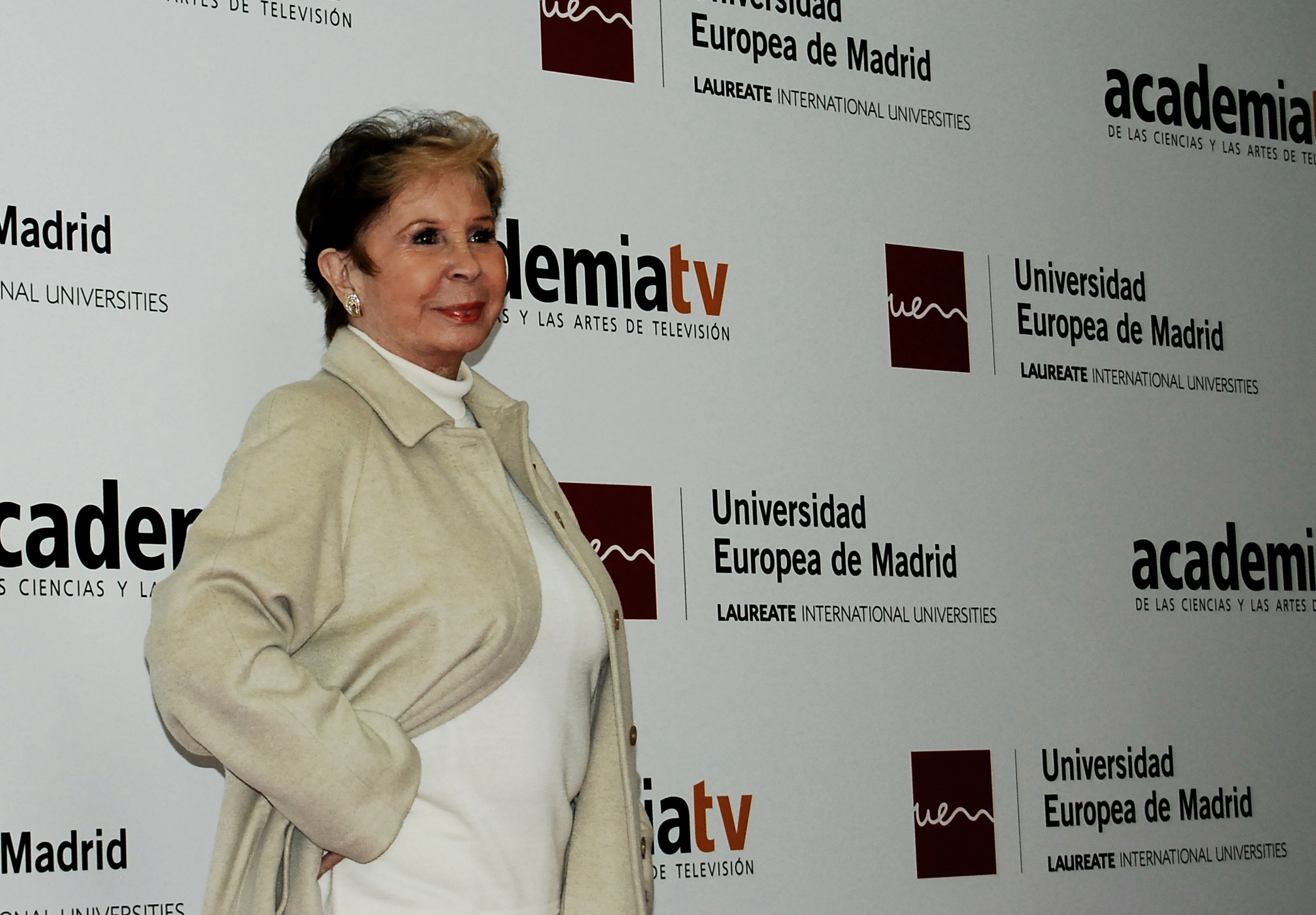 La actriz Lina Morgan en 2012.